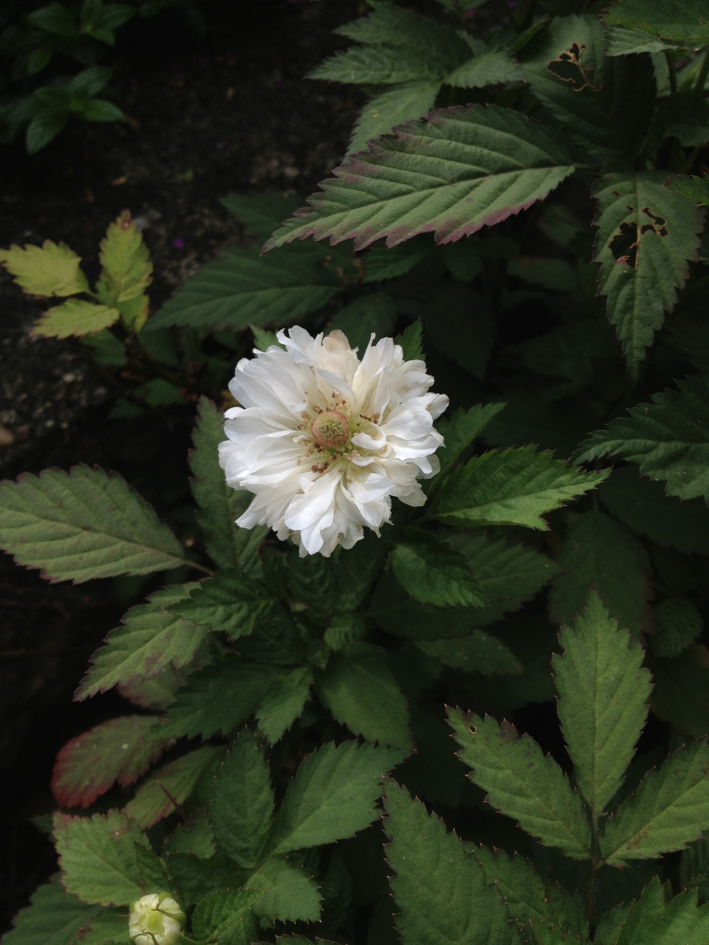 Viaje a Trujillo, concurso.